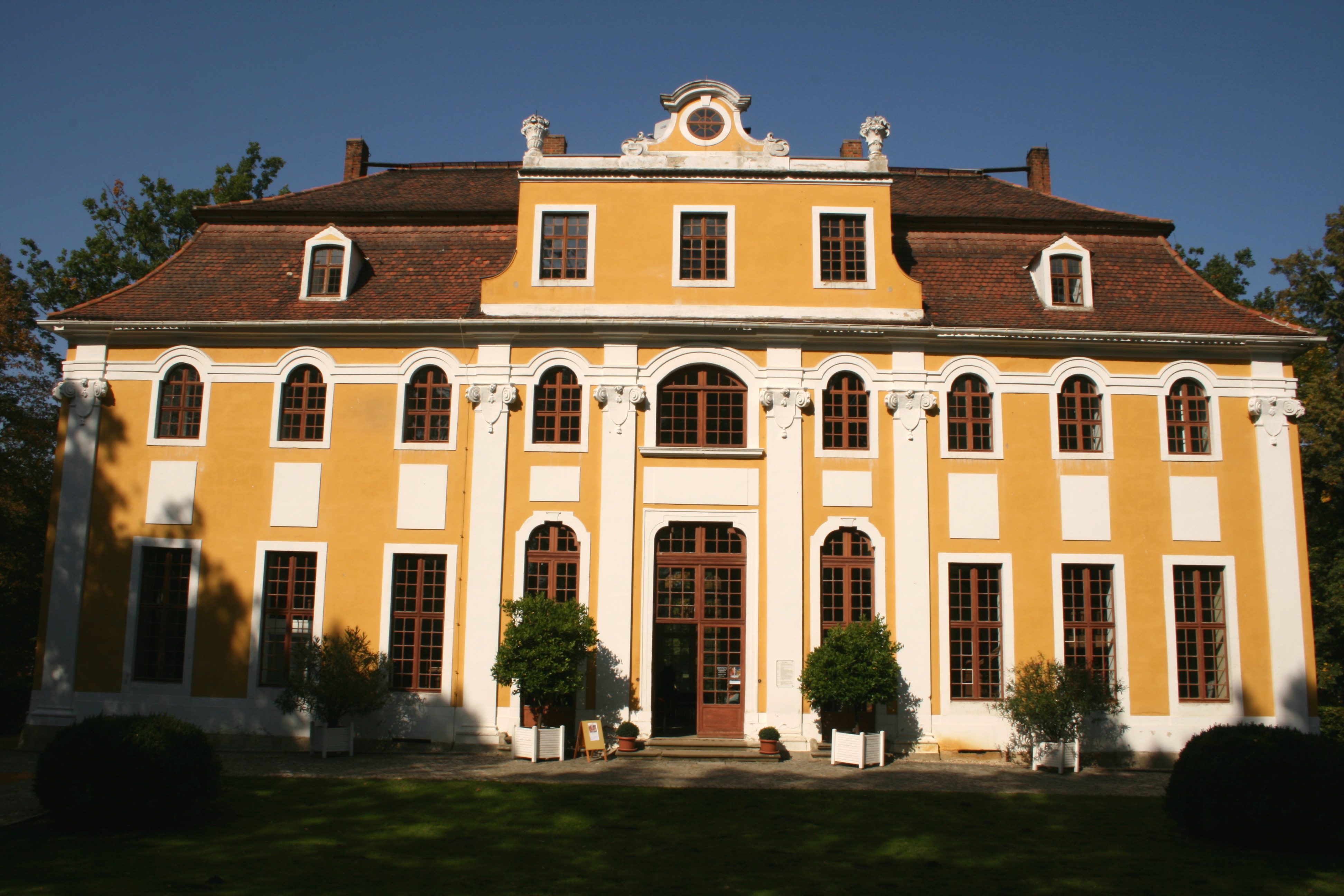 Blick auf das Schloss von Süden Hornjoserbsce: Njeswačanski barokowy hród.